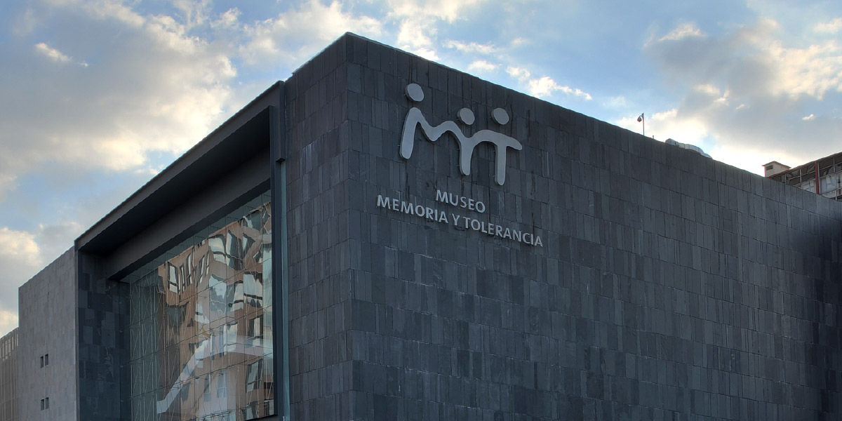 Vista exterior del Museo Memoria y Tolerancia